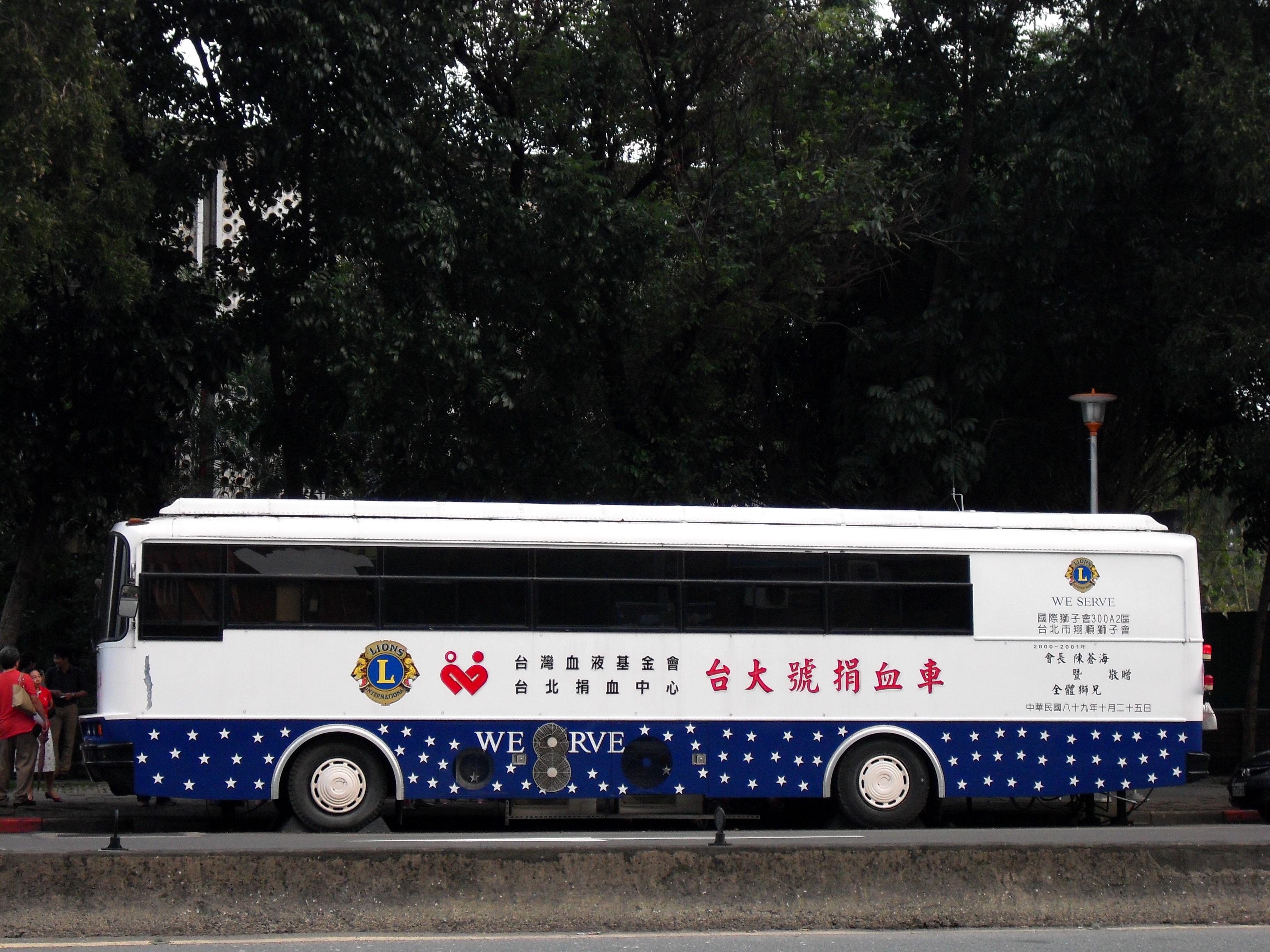 Bân-lâm-gú: 台灣血液基金會台北捐血中心台大號捐血車，停佇臺北市新生南路三段路邊。